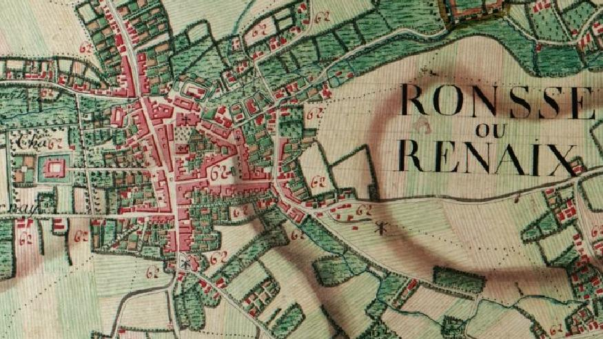 DETAIL VAN RONSE OP DE FERRARISKAART